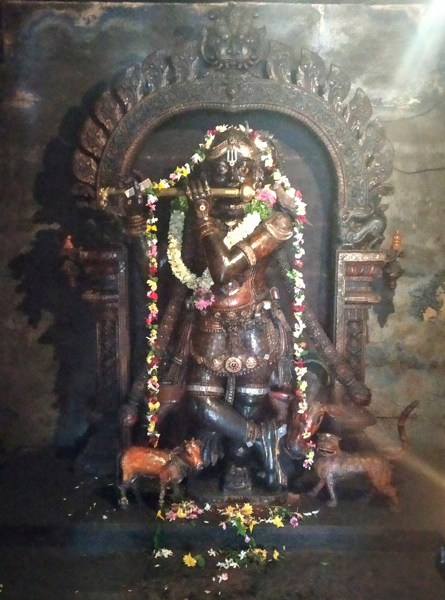 முத்து கருப்பண்ண சாமி என்கிற கருப்பு. வைரசெட்டி பாளையம் என்ற இடத்திலுள்ள மாசி பெரியண்ண சுவாமி கோயிலில் உள்ளது.